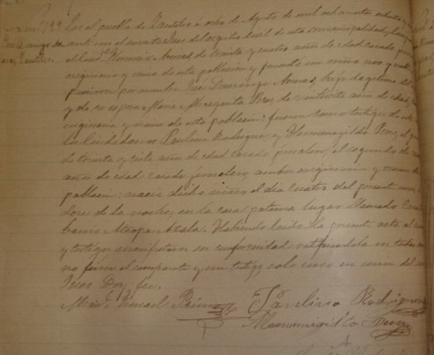 Acta de Nacimiento de José Domingo Arenas, Juzgado del Registro Civil del municipio de Zacatelco, Tlaxcala; Libro No. 01 relativo a las actas de nacimiento de 1888, foja No. 51 vuelta, consultada el 18 de Septiembre de 2009.